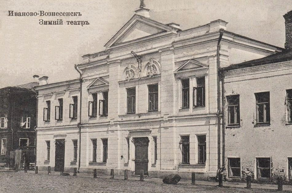 Концертный зал общественного собрания Иваново-Вознесенск в нач. ХХ в.